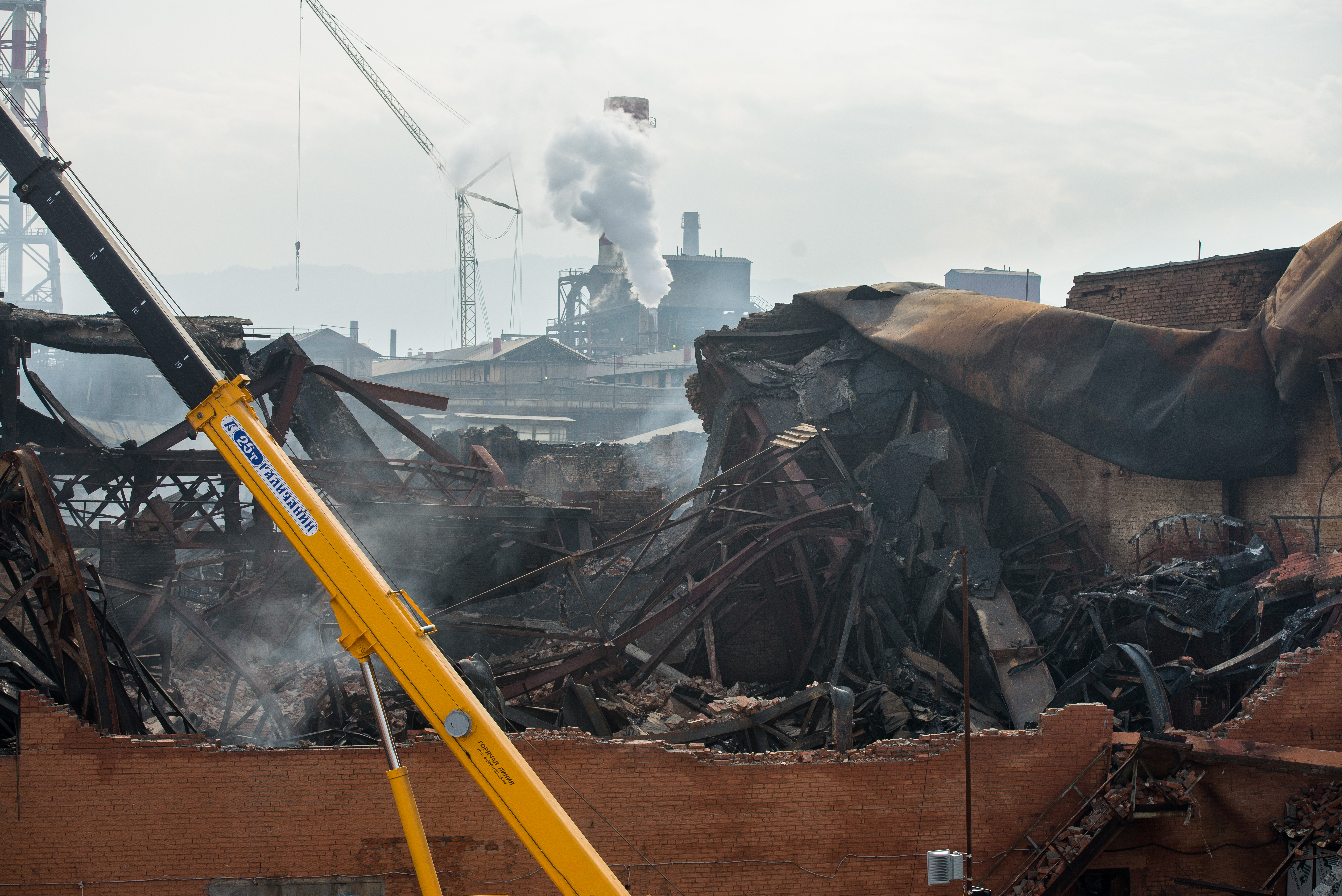 Владикавказ. Завод «Электроцинк» после пожара 21.10.2018